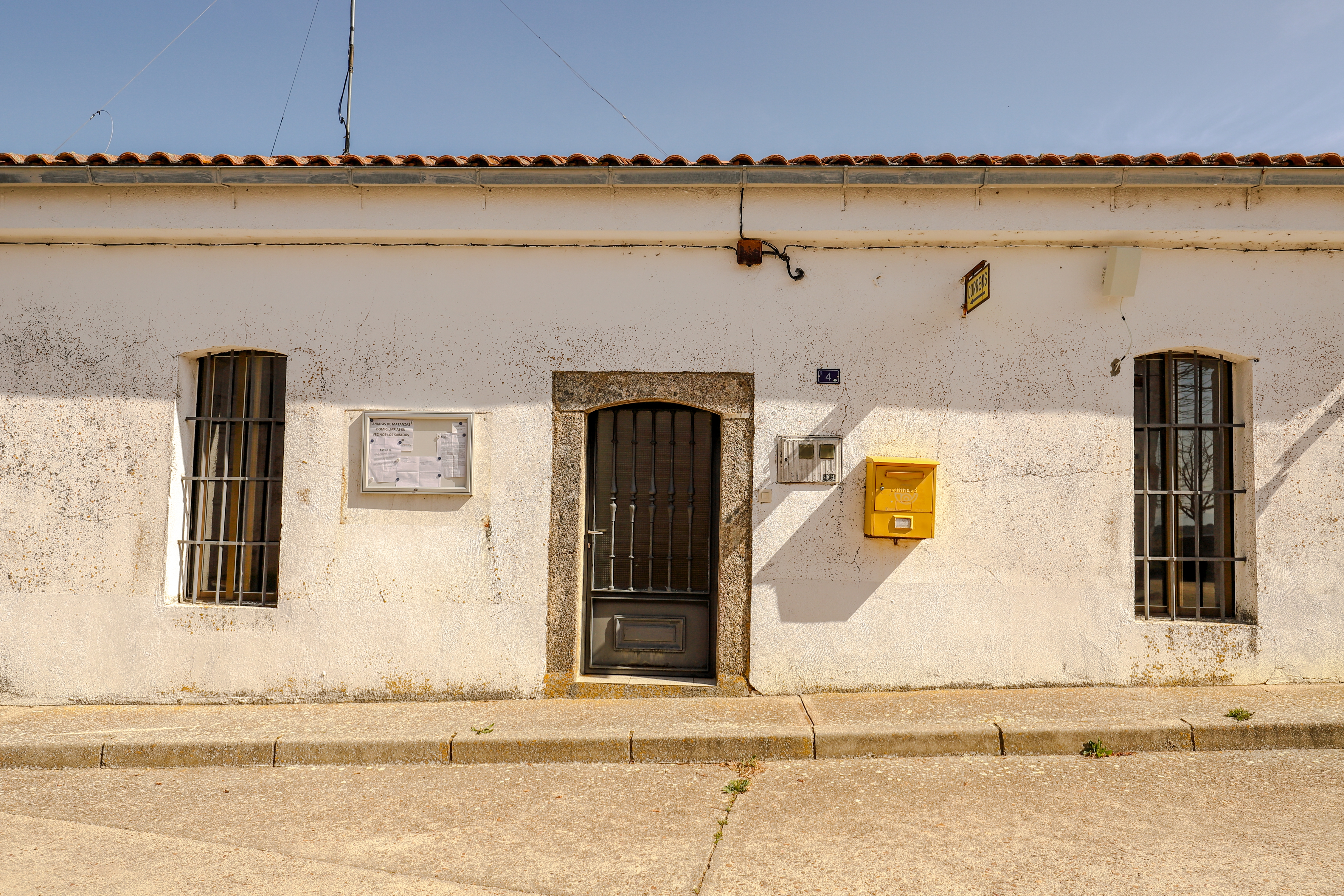 Garcirrey es un municipio de la comarca Campo de Salamanca, provincia de Salamanca.